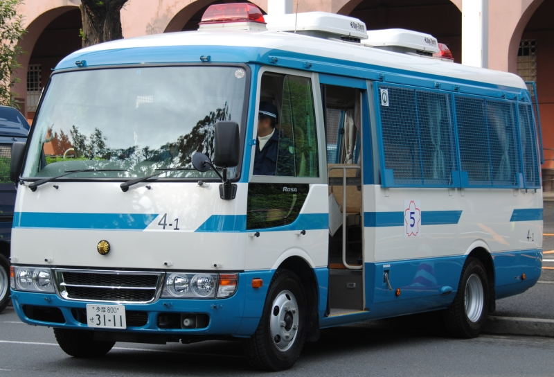 警視庁の中型輸送車。